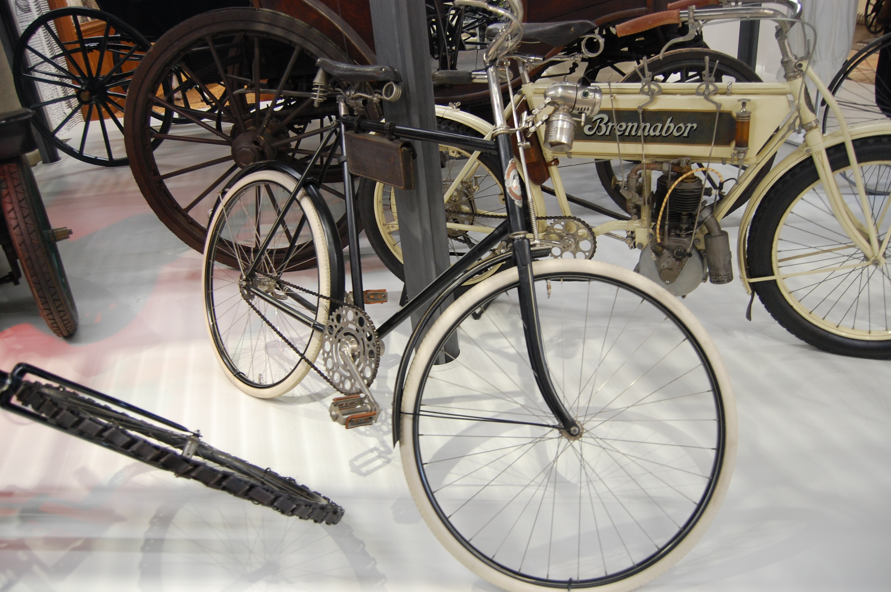 Dieses Exponat ist im Verkehrsmuseum Dresden zu sehen